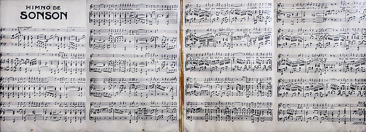 Partitura del Himno de Sonsón exhibida en el Museo Casa de los Abuelos. Sonsón, Colombia.